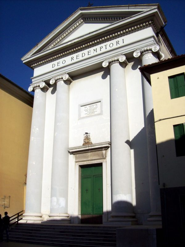 Udine, Chiesa del Redentore, progettata nel 1833 dall'architetto Giovanni Battista Bassi